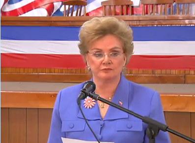 Política Salvadoreña, Fundadora de ARENA, lanza Candidatura a la Presidencia